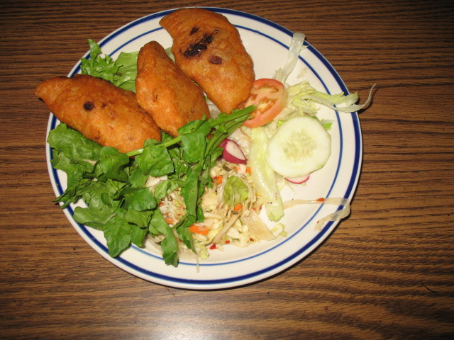 Platillo tipico de el salvador, elaborado, de masa y rellenos de de picadillo de carne con papas, se acompaÑA de ensalada de repollo.